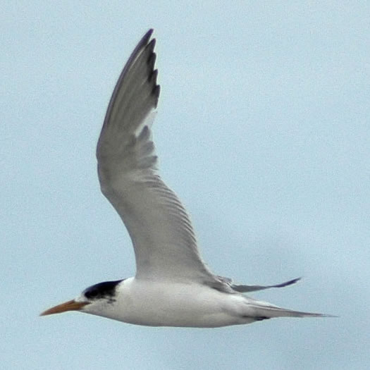 Bird, Crested Tern, Sterna bergii